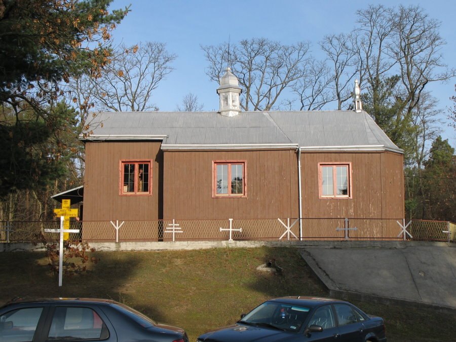 Mołodycz (Poland), Greek Catholic church